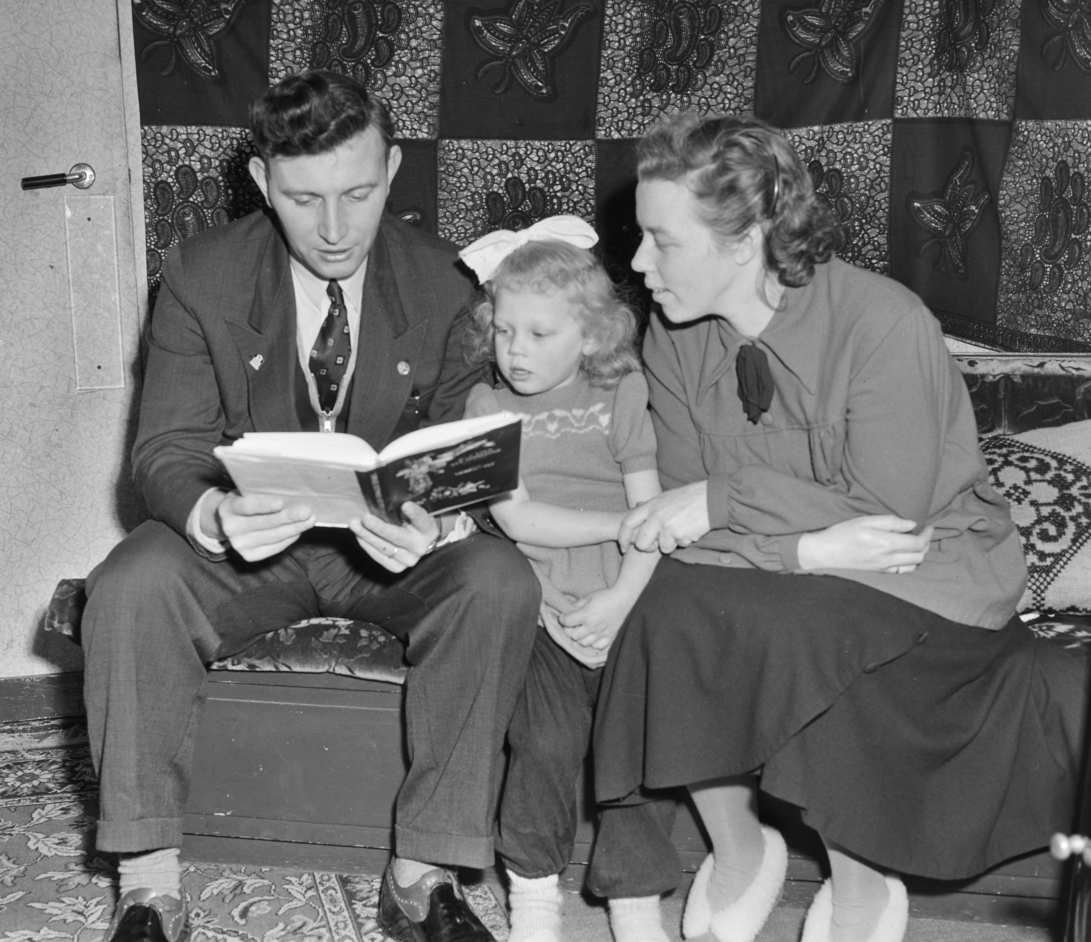 Collectie / Archief : Fotocollectie Anefo Reportage / Serie : [ onbekend ] Beschrijving : Serie bezoek bij Abe Lenstra (familie) Datum : 29 januari 1952 Trefwoorden : FAMILIE, SERIEs, bezoeken Persoonsnaam : Lenstra, Abe Fotograaf : Pot, Harry / Anefo Auteursrechthebbende : Nationaal Archief Materiaalsoort : Negatief (zwart/wit) Nummer archiefinventaris : bekijk toegang 2.24.01.04 Bestanddeelnummer : 904-9533